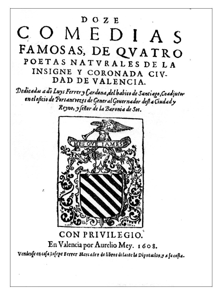 DOZE / COMEDIAS / FAMOSAS, DE QVATRO / POETAS NATVRALES DE LA / INSIGNE Y CORONADA CIV- / DAD DE VALENCIA./ [Escudo] / En Valencia por Aurelio Mey. 1608.